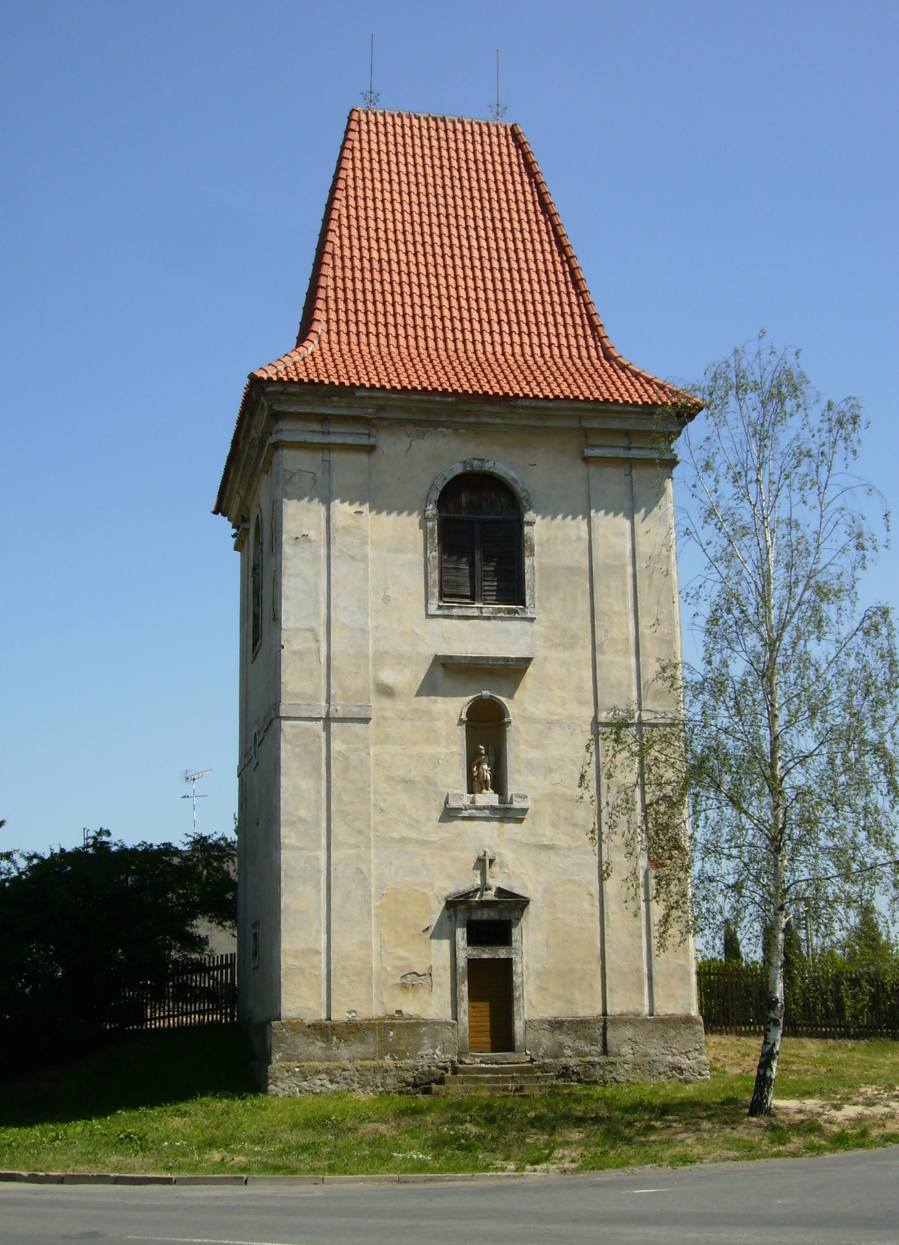 Dřevčická zvonice u silnice II/610.